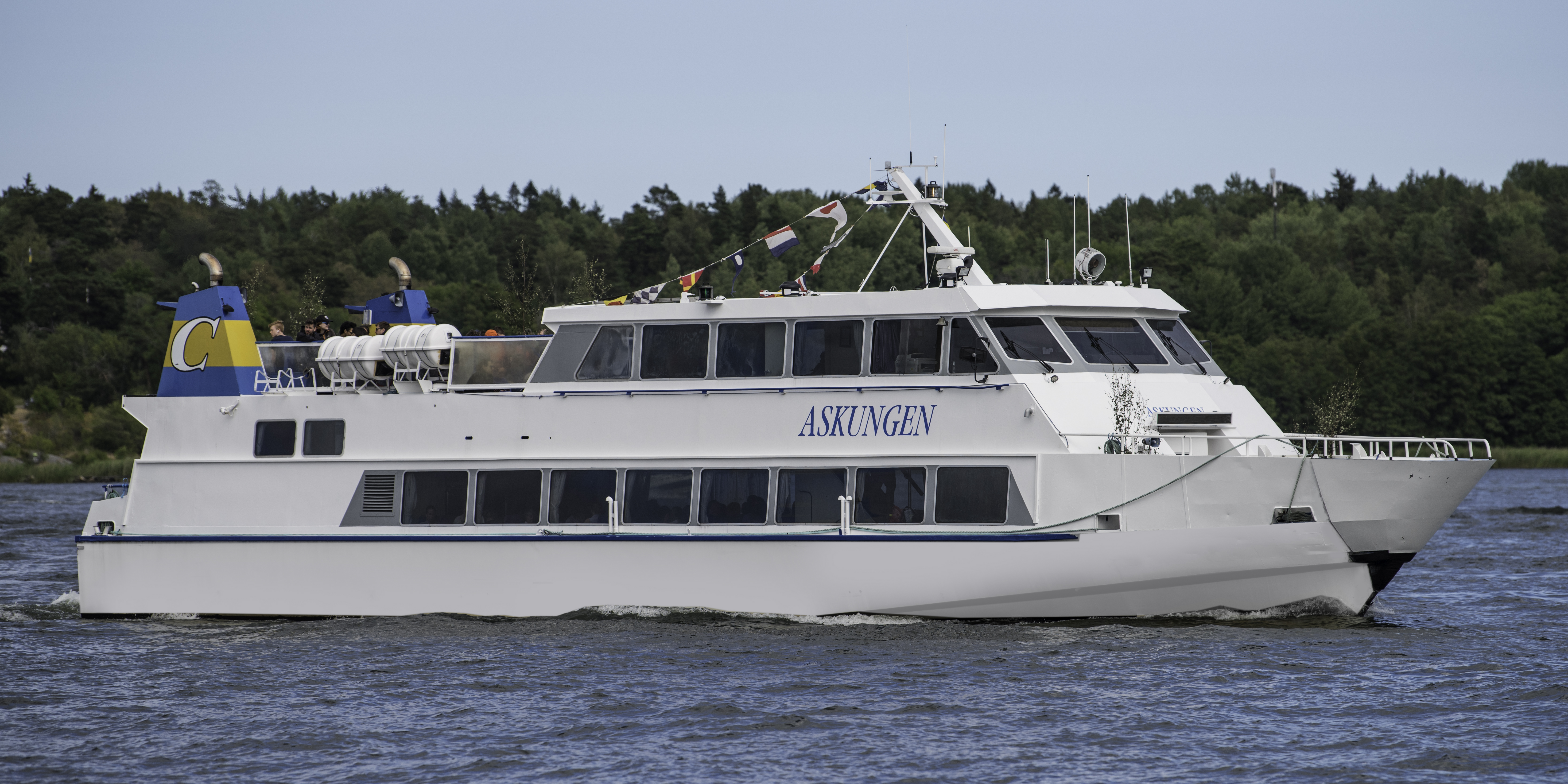 Ships, Vaxholm, Stockholm, Sweden, June 2018